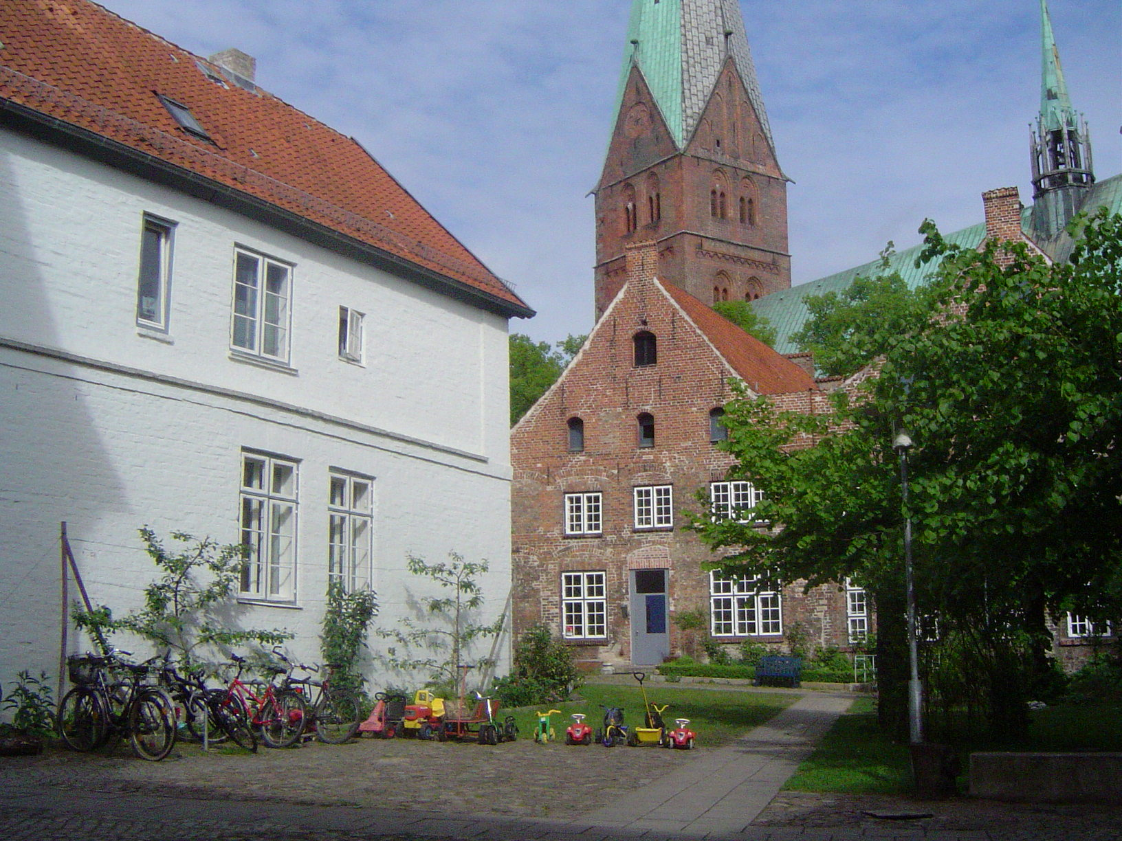 Aegidienhof in Lübeck mit Aegidienkirche im Hintergrund This is a photograph of an architectural monument.It is on the list of cultural monuments of Lübeck